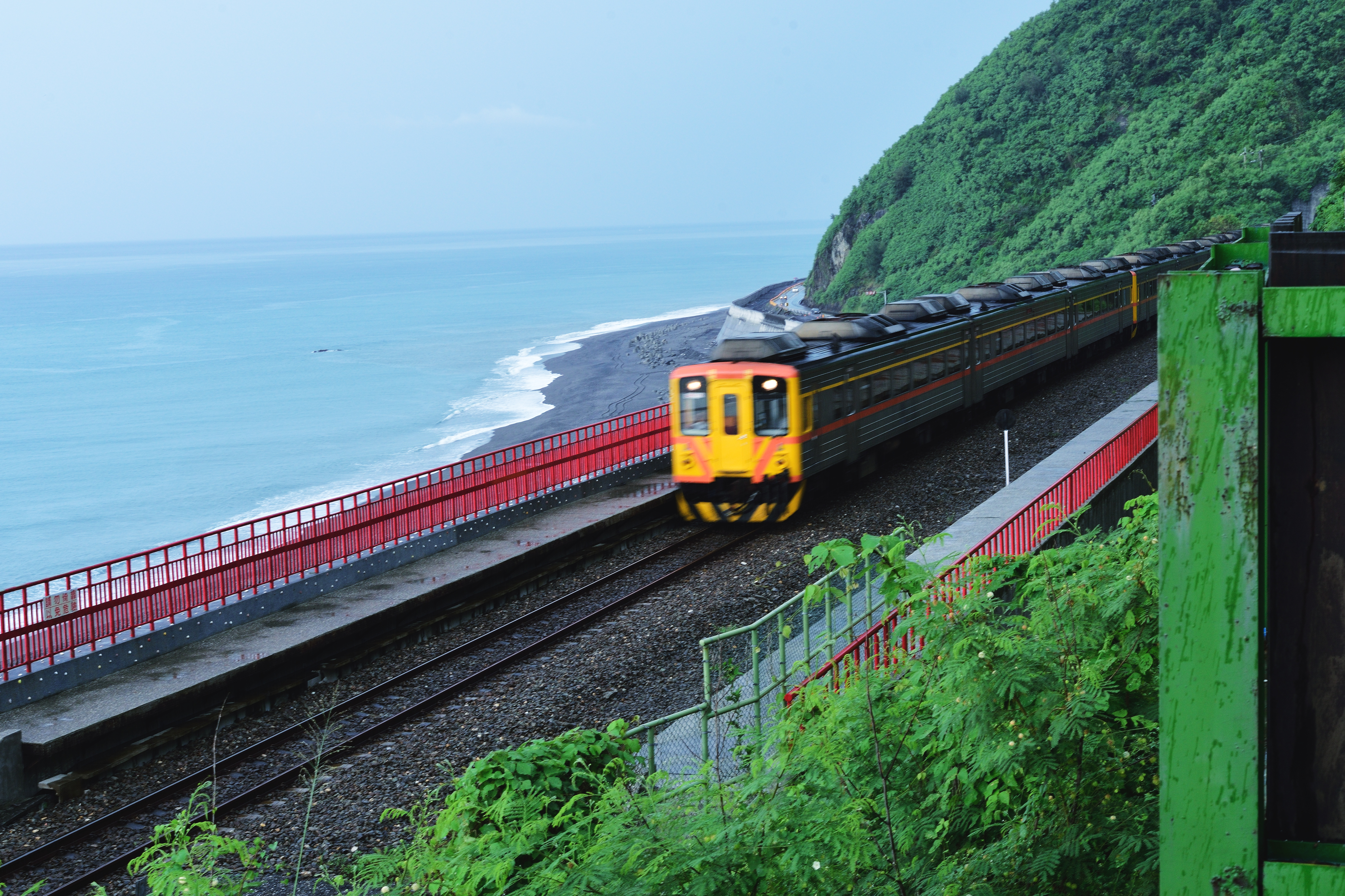 26-多良車站